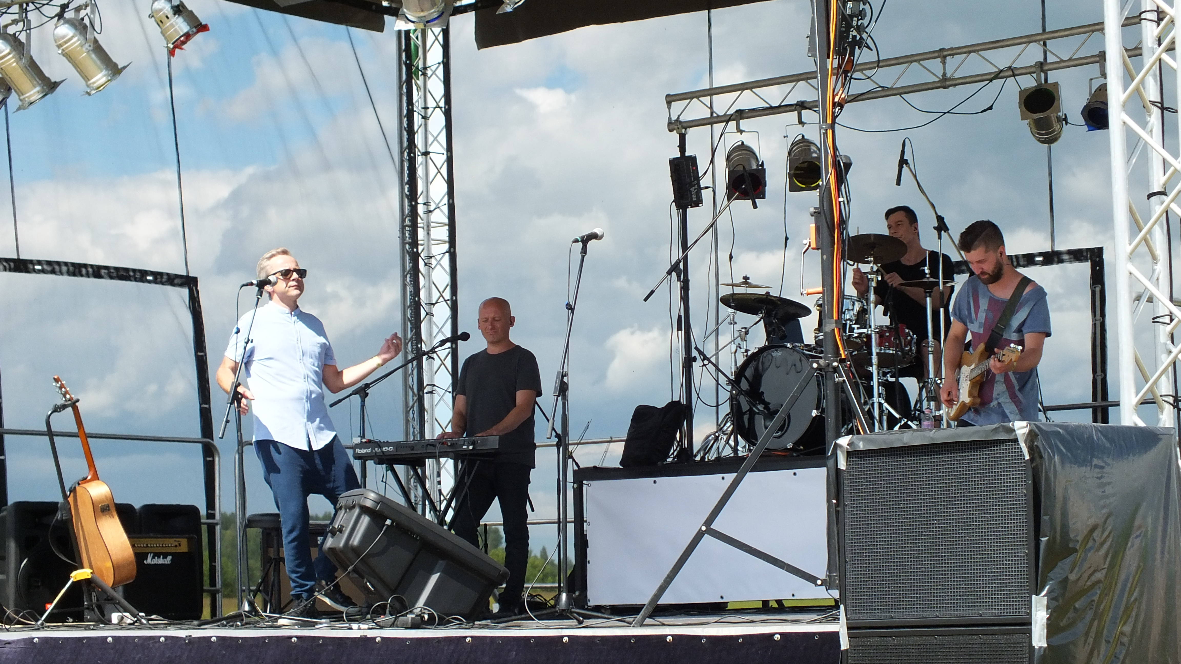 Otra Puse aviācijas svētkos Degumniekos